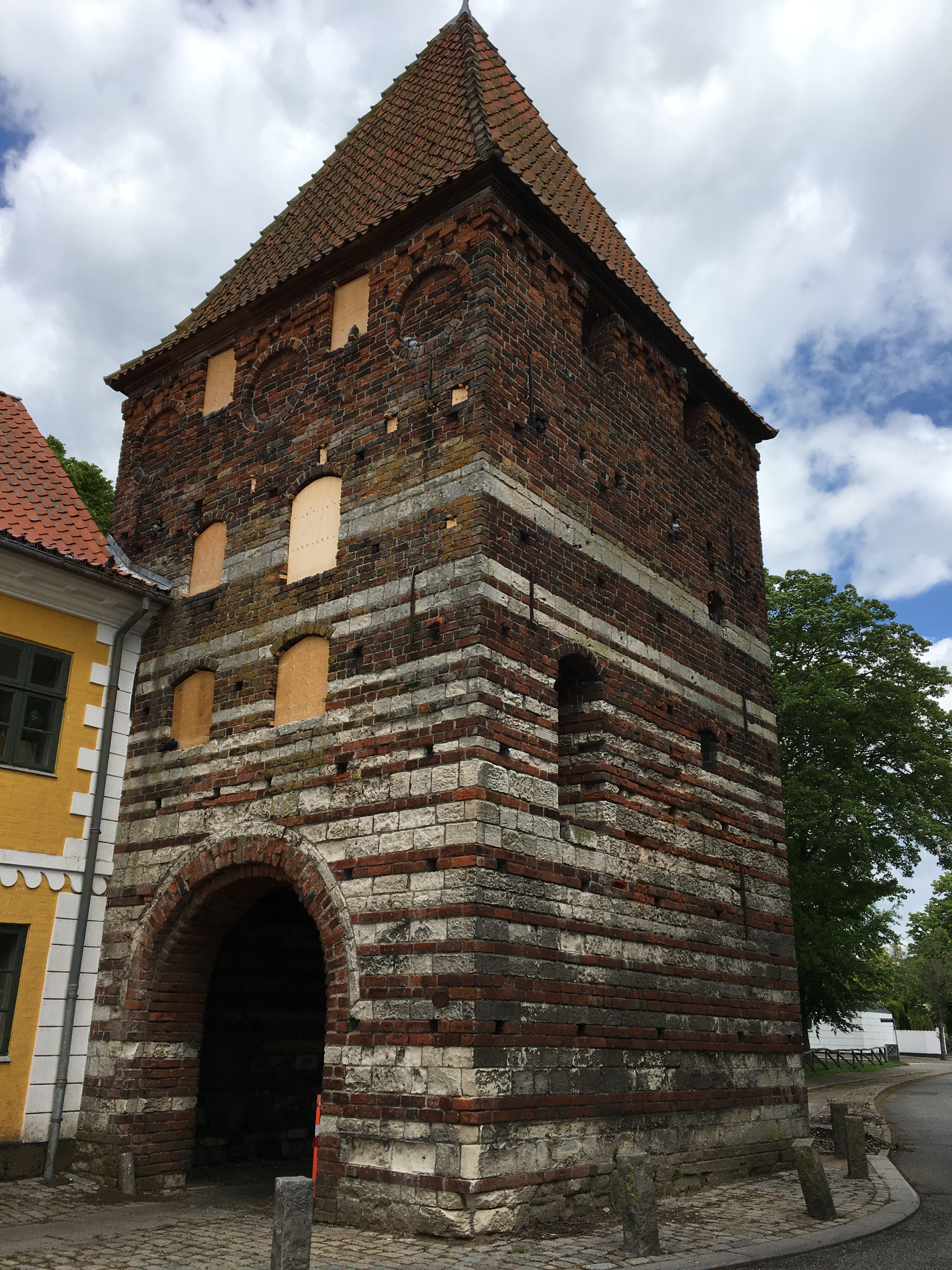 Mølleporten i 2020 under renovering.